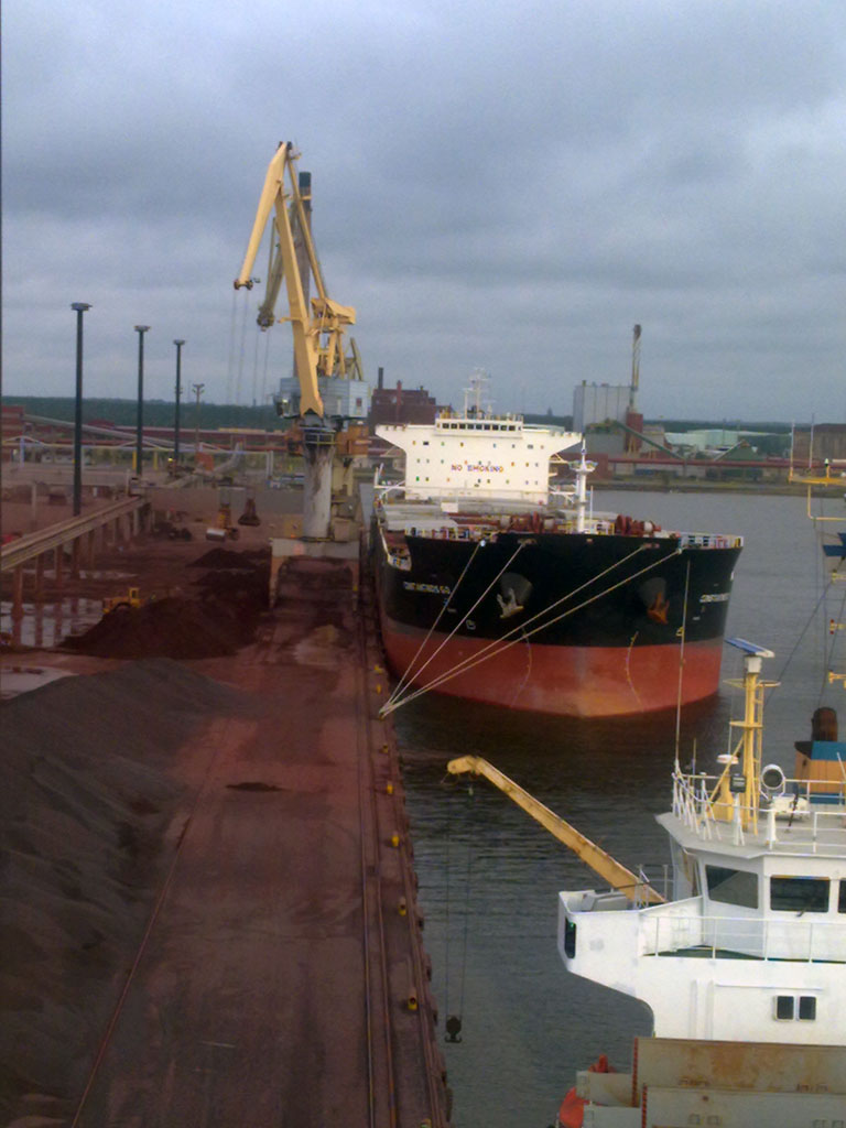 Kokkolan syväsatama